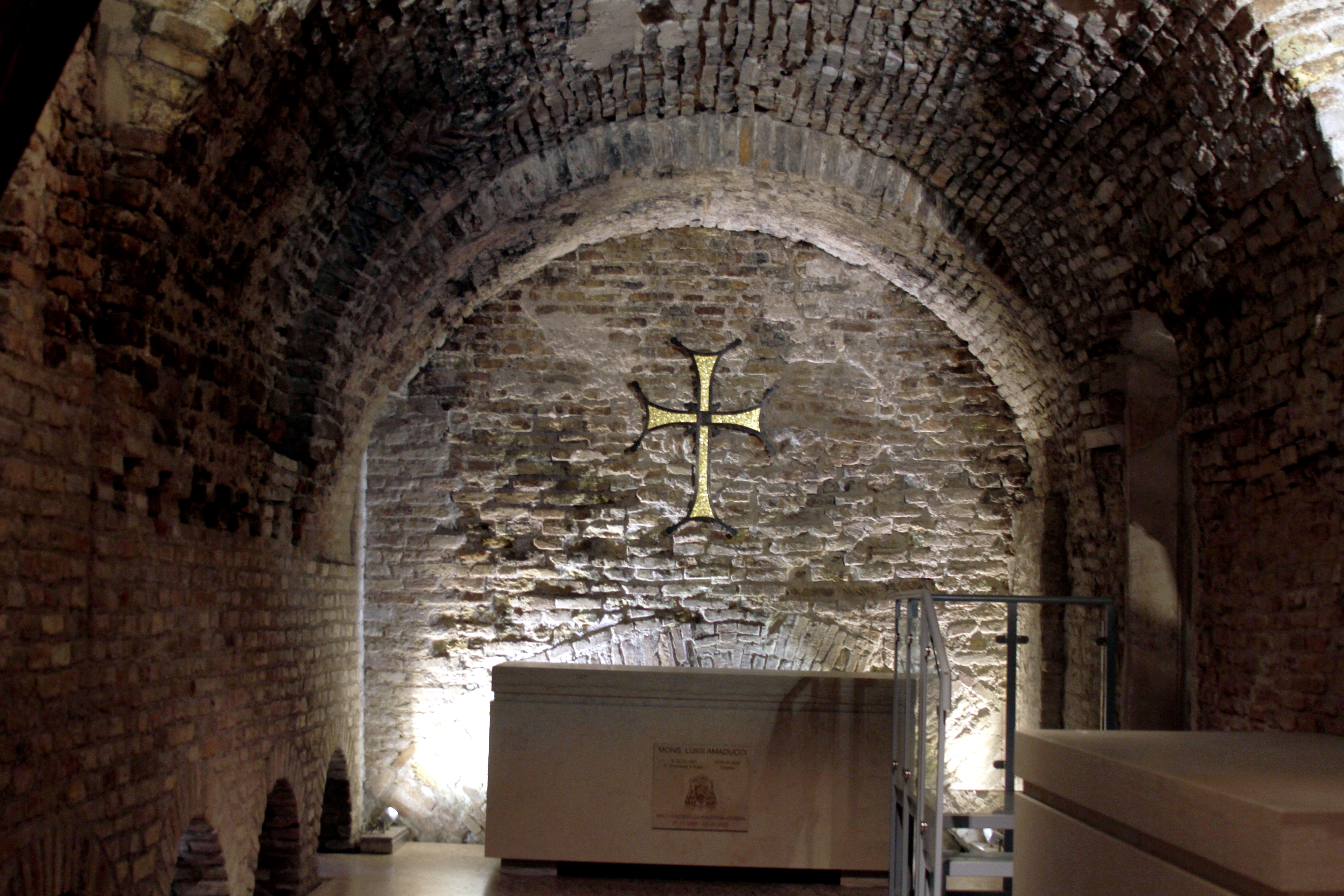 Duomo - Ravenna